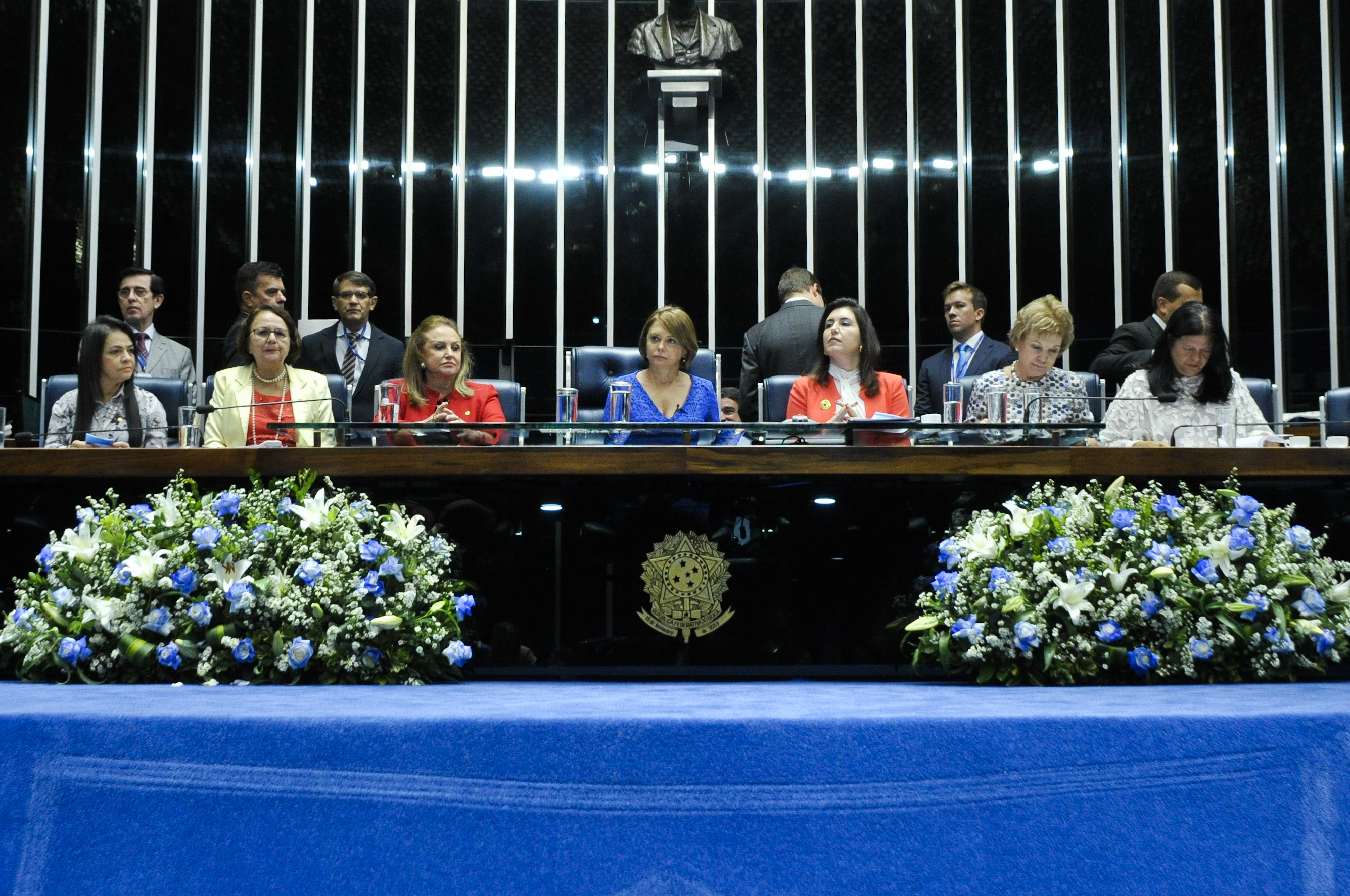 Sessão Solene do Congresso Nacional destinada à comemoração do Dia Internacional da Mulher e à entrega do Diploma Bertha Lutz em sua 15ª Premiação. (E/D): deputada Moema Gramacho (PT-BA); deputada Jô Moraes (PCdoB-MG); deputada Elcione Barbalho (PMDB-PA); senadora Ângela Portela (PT-RR); senadora Simone Tebet (PMDB-MS); senadora Marta Suplicy (PMDB-SP) deputada Laura Carneiro (PMDB-RJ) Foto: Geraldo Magela/Agência Senado